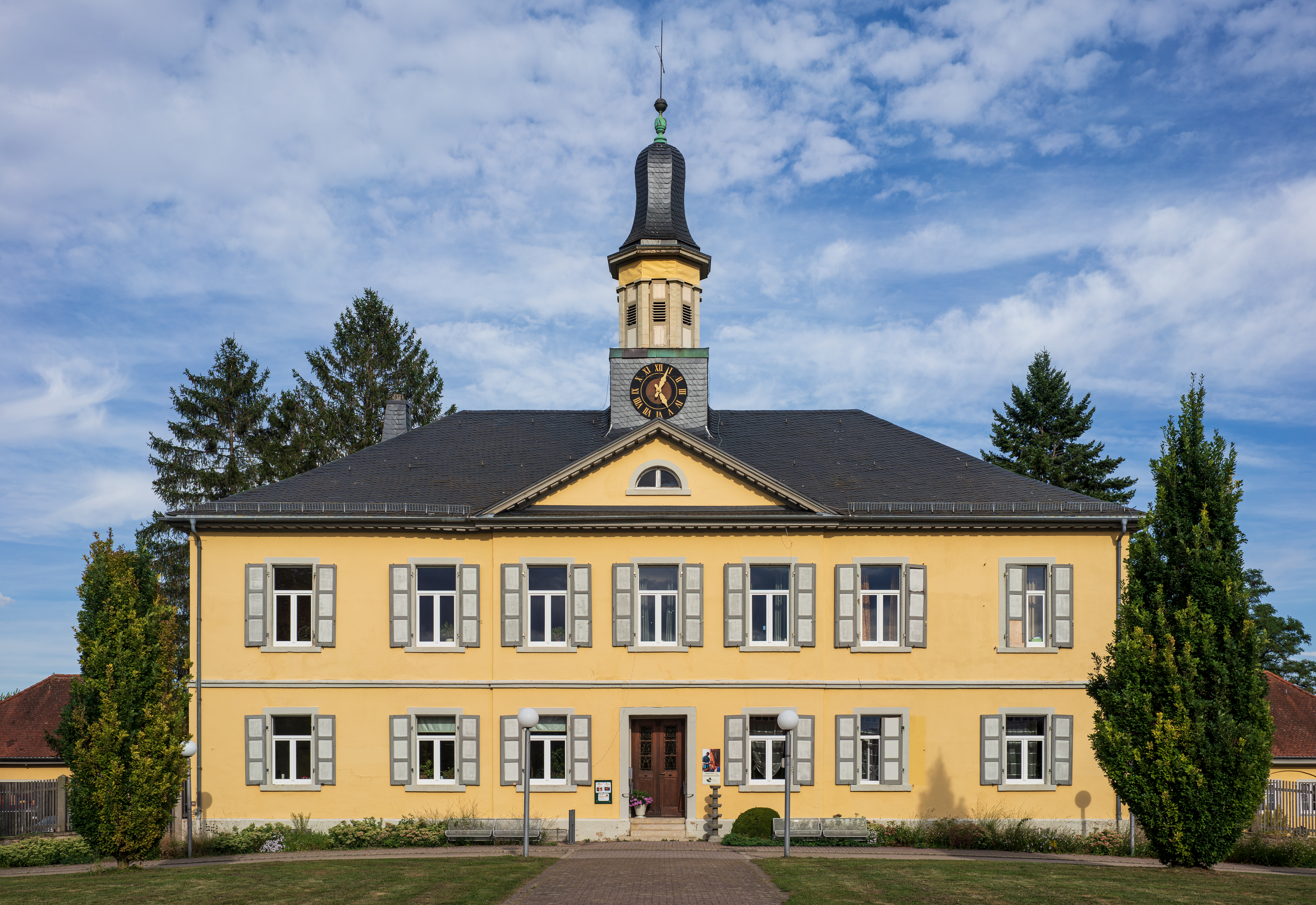 Bad Rappenau: Das Salinenamtsgebäude, Ansicht der Hauptfassade von Westen. Dieses um 1830 erbaute Gebäude war der Sitz der Verwaltung der Ludwigssaline, deren Salzproduktion einst sehr bedeutend war.